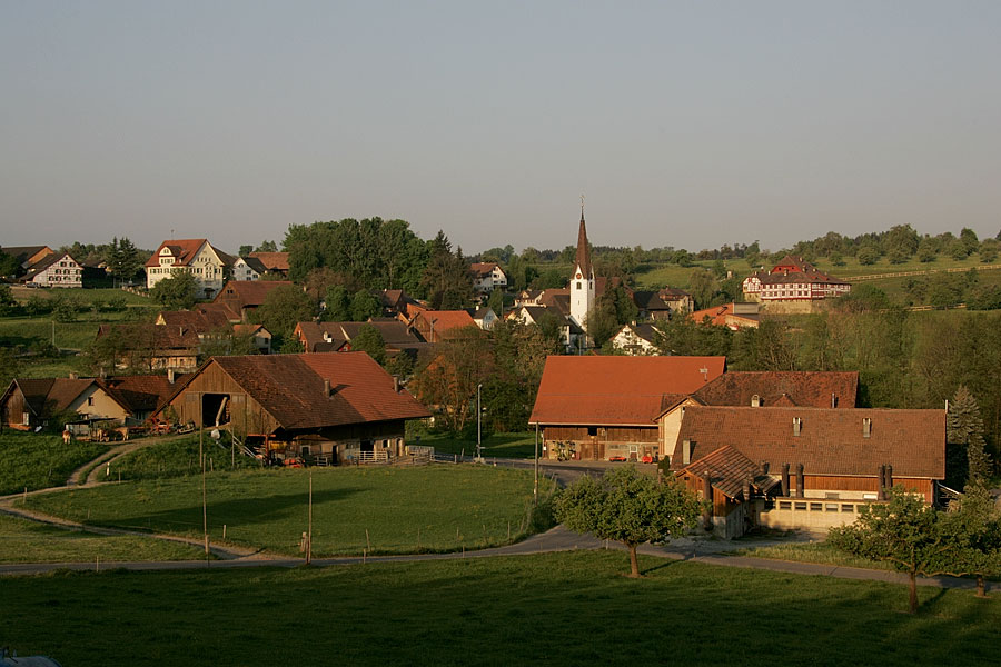 Hagenwil